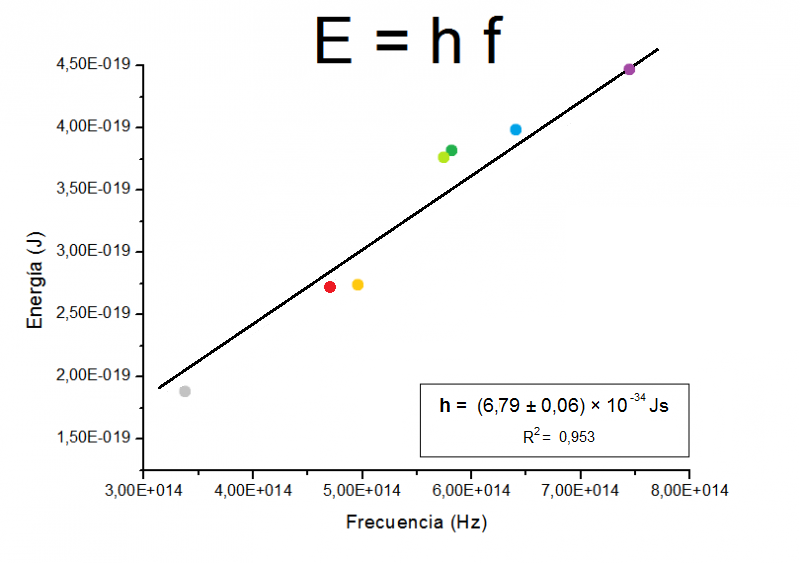 Representación gráfica de la frecuencia de cada diodo frente a la energía